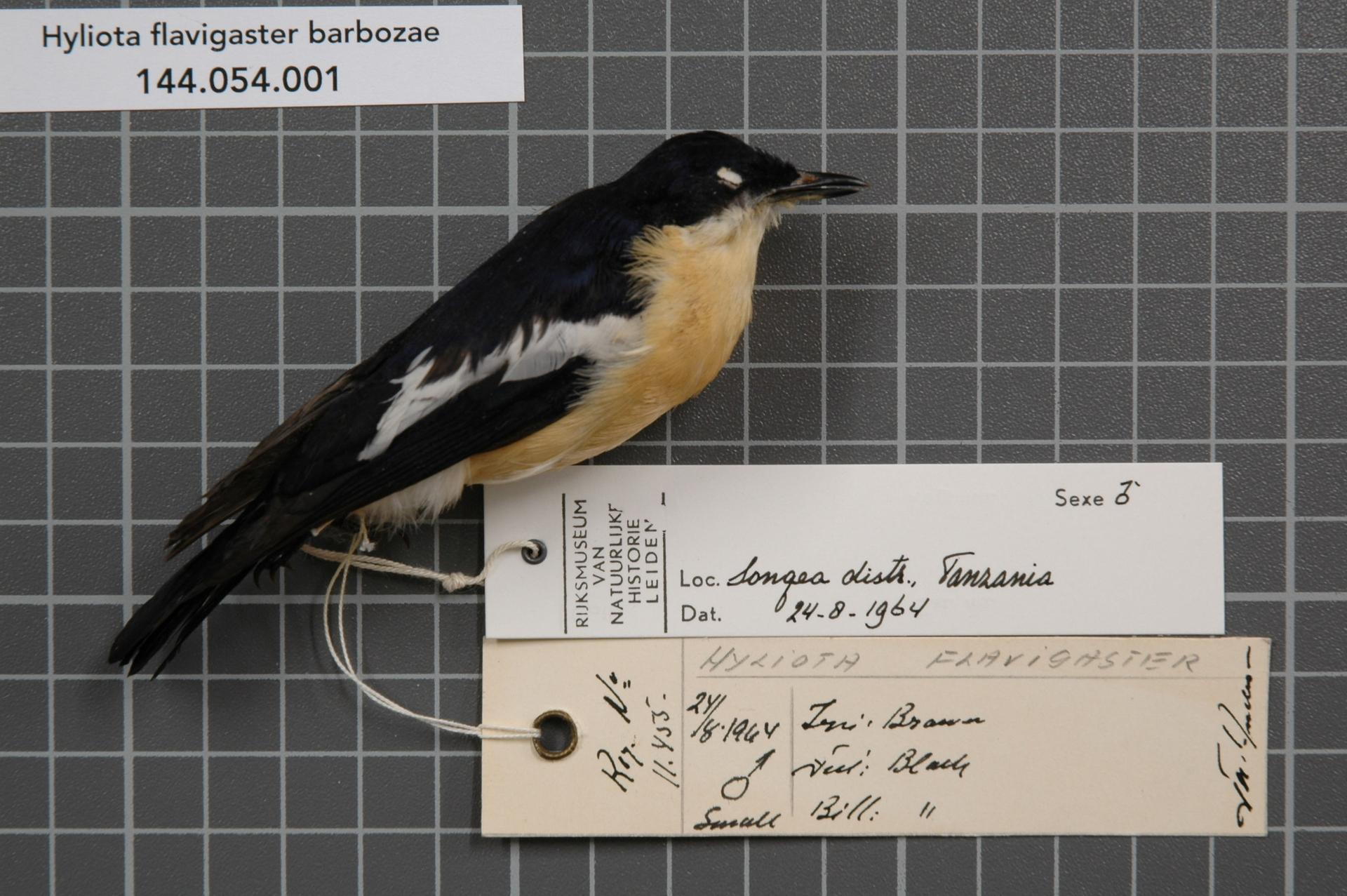 Hyliota flavigaster barbozae Hartlaub, 1883